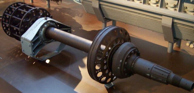 Luftschraubenantriebswelle, eigenes Bild, GFDL